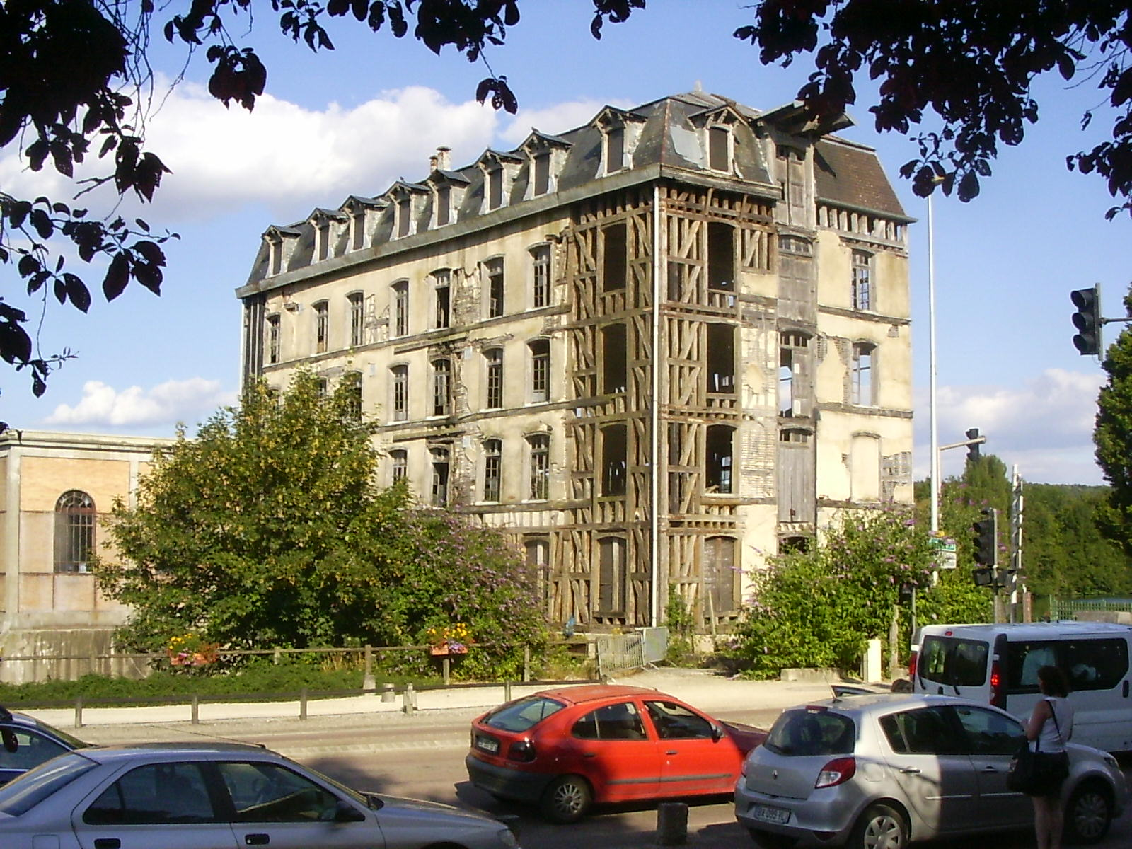 Bar-sur-Seine, watermolen